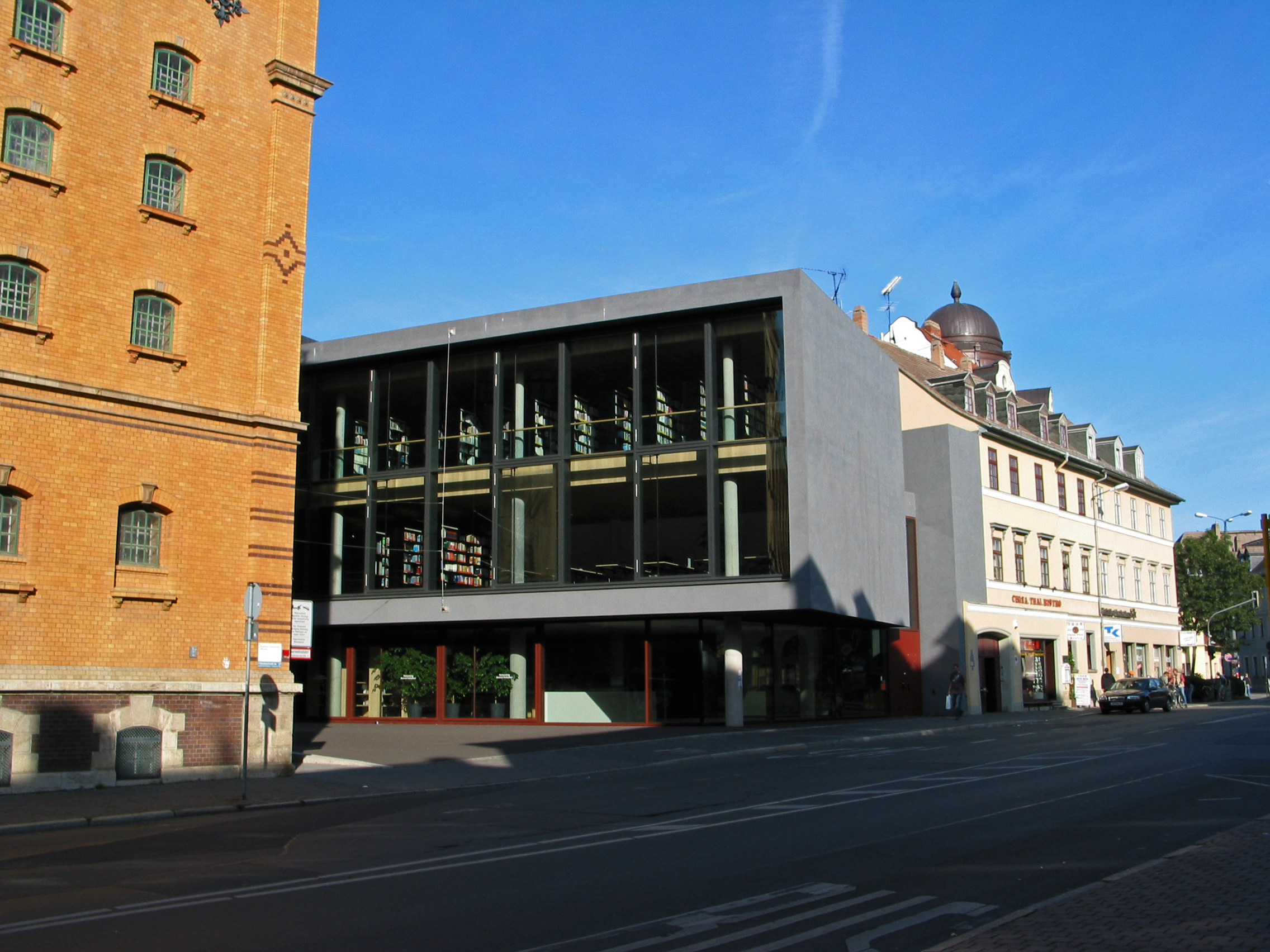 Neubau der 2005 fertiggestellten Universitätsbibliothek mit integriertem Audimax (Bauhaus-Universität) an der Steubenstraße in Weimar.